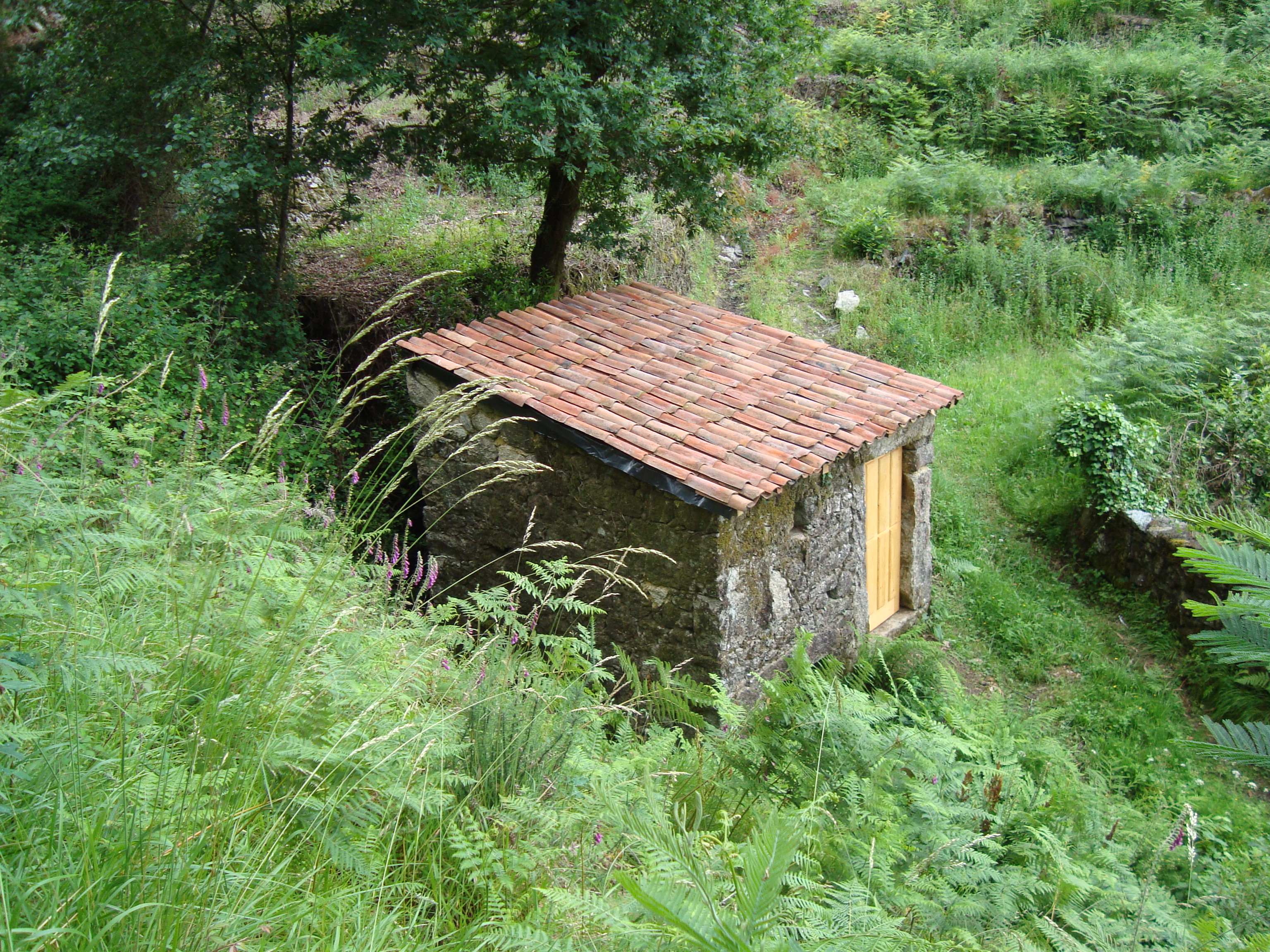 Moinho de Rodizio, no riacho de Sarnados, na freguesia de Quintiães, Barcelos, Portugal.